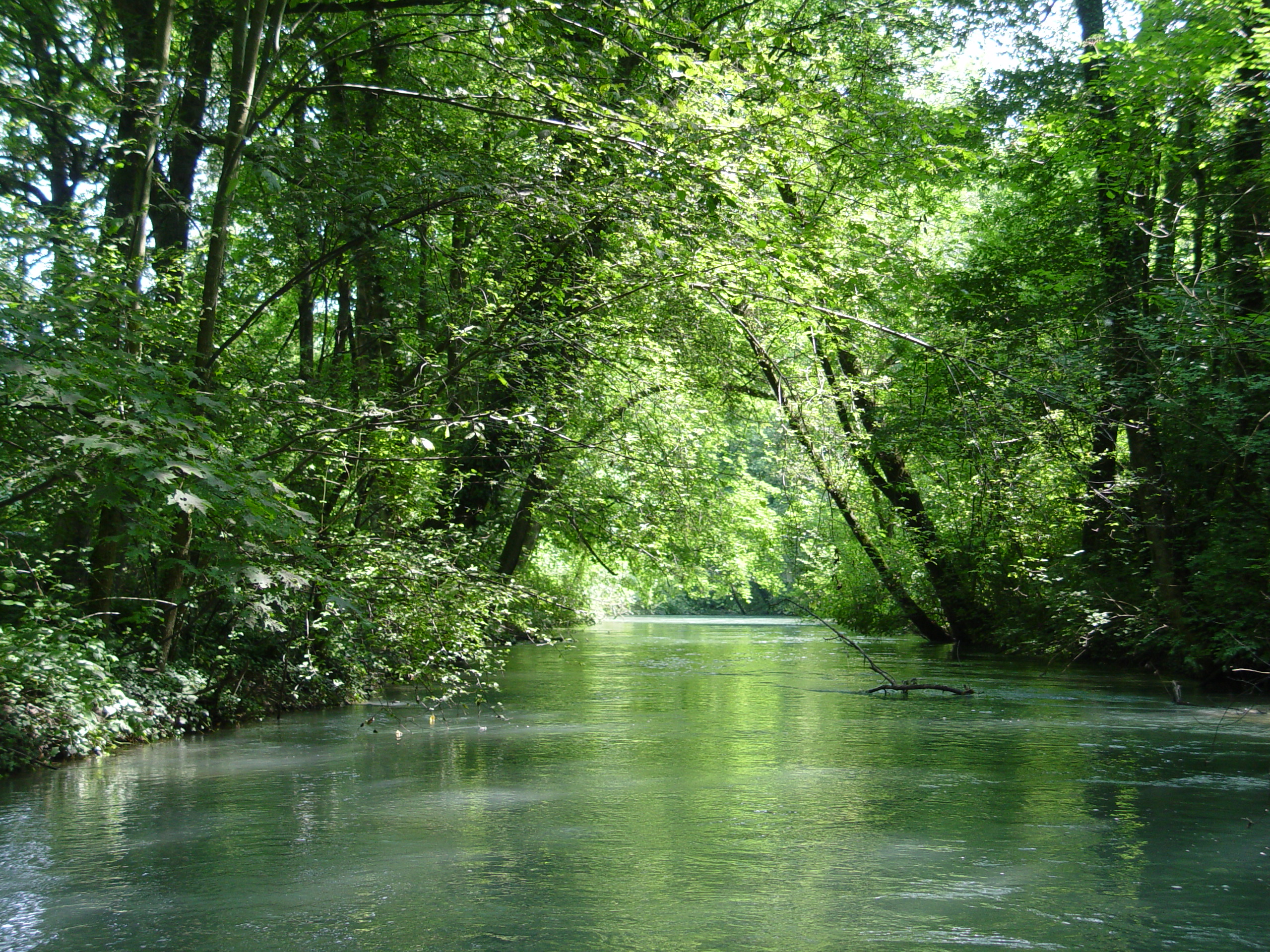 Alte Aare nördlich von Aarberg